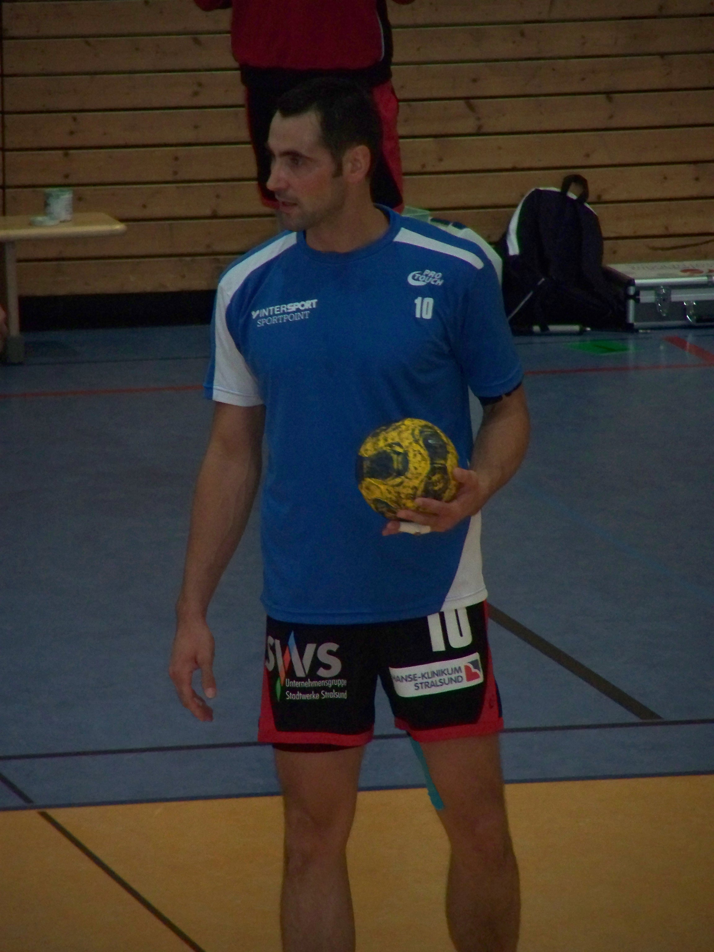 Benny Lindt vom de.Stralsunder HV am 26.09.2009 beim Oberliga-Spiel gegen den SV Banzkow-Leezen in der Stralsunder Diesterweghalle.